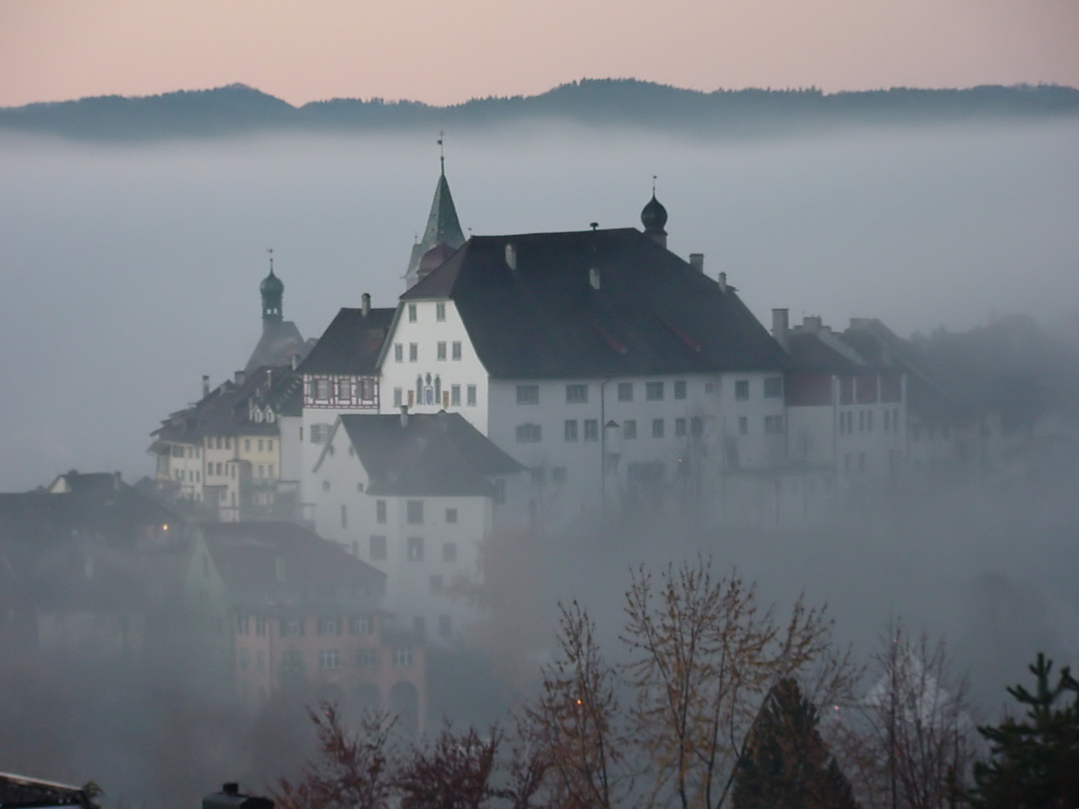 Altstadt, Wil (CH)